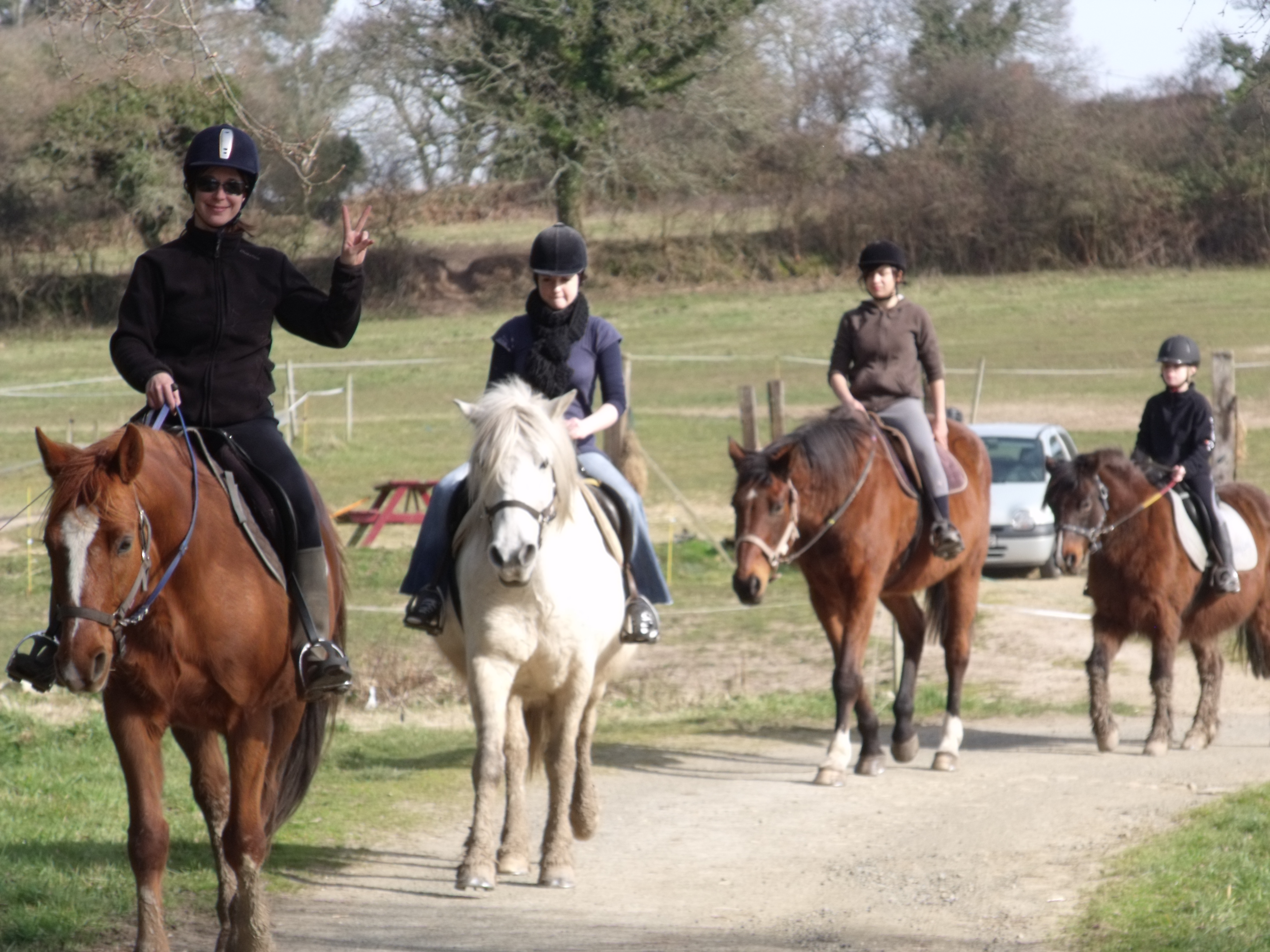 Randonnée équestre, Pleumeur Bodou